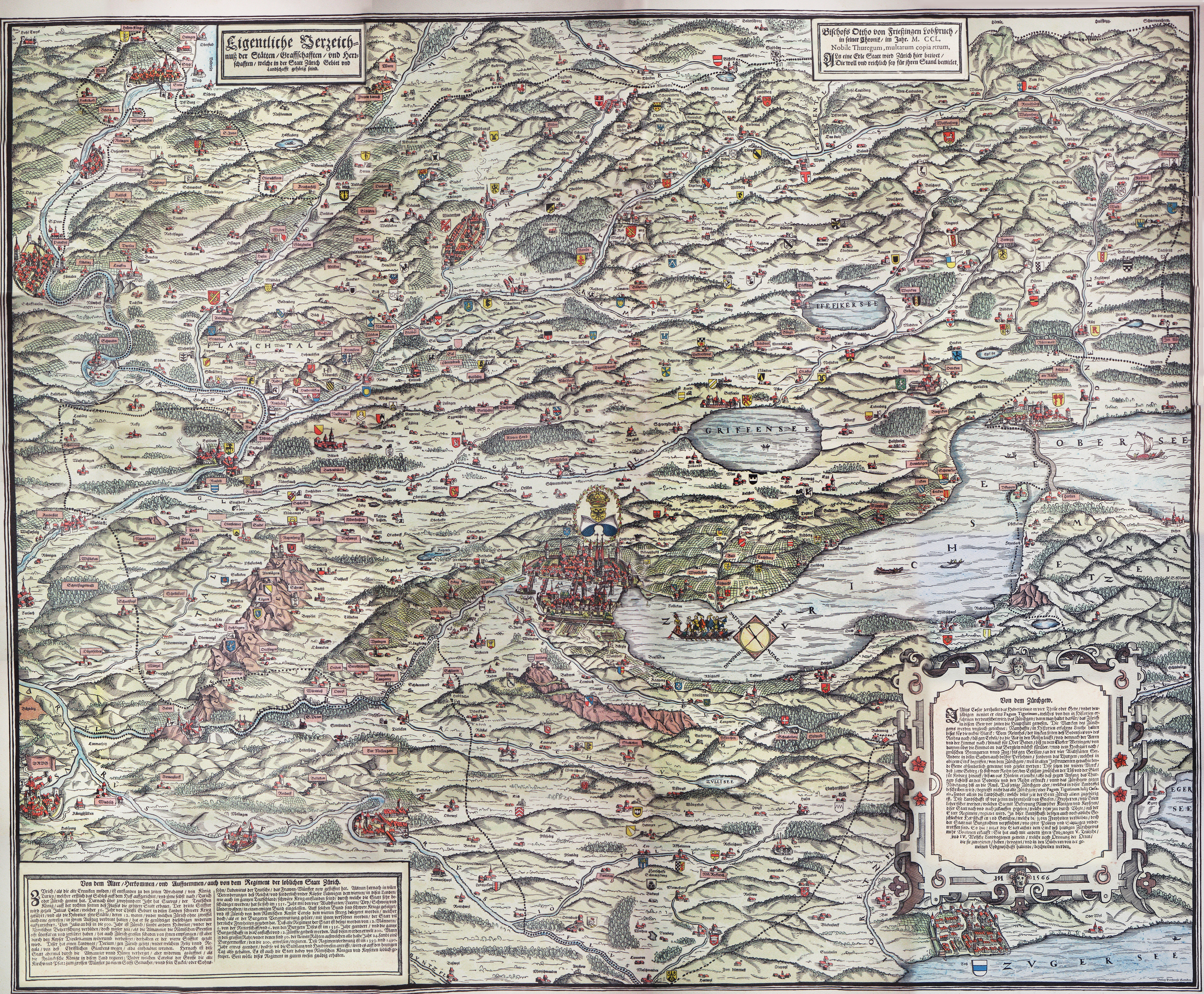 Kantonskarte von Jos Murer von 1566